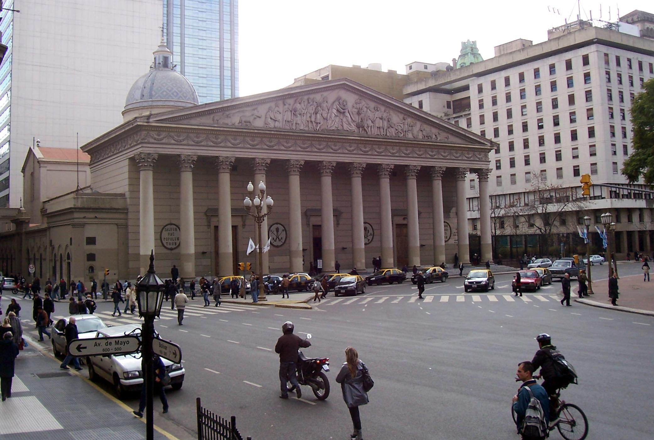 Catedral de la Ciudad de Buenos Aires